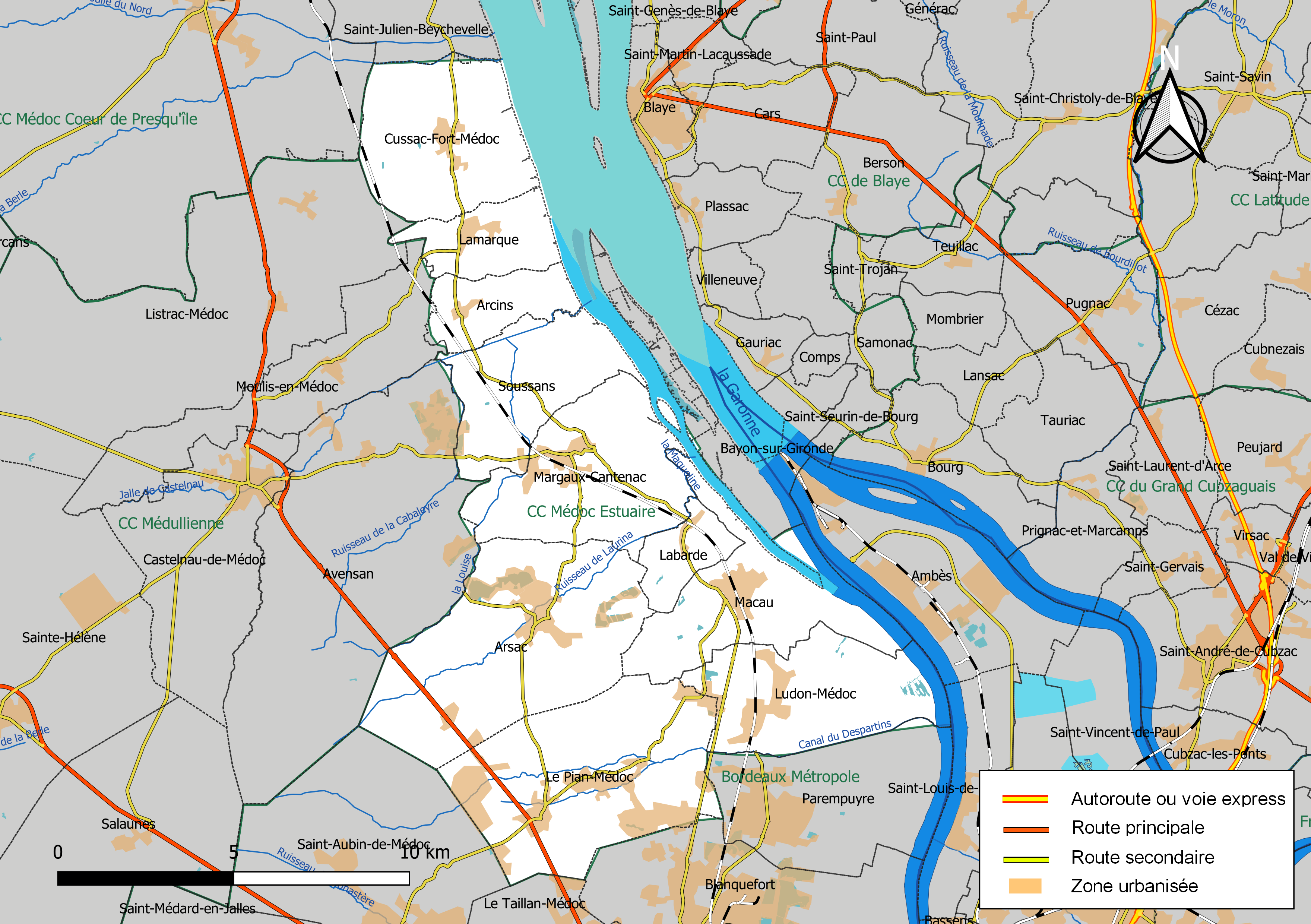 Carte géographique de la Communauté de communes Médoc Estuaire, département de la Gironde, France. Composition au 1er janvier 2019.